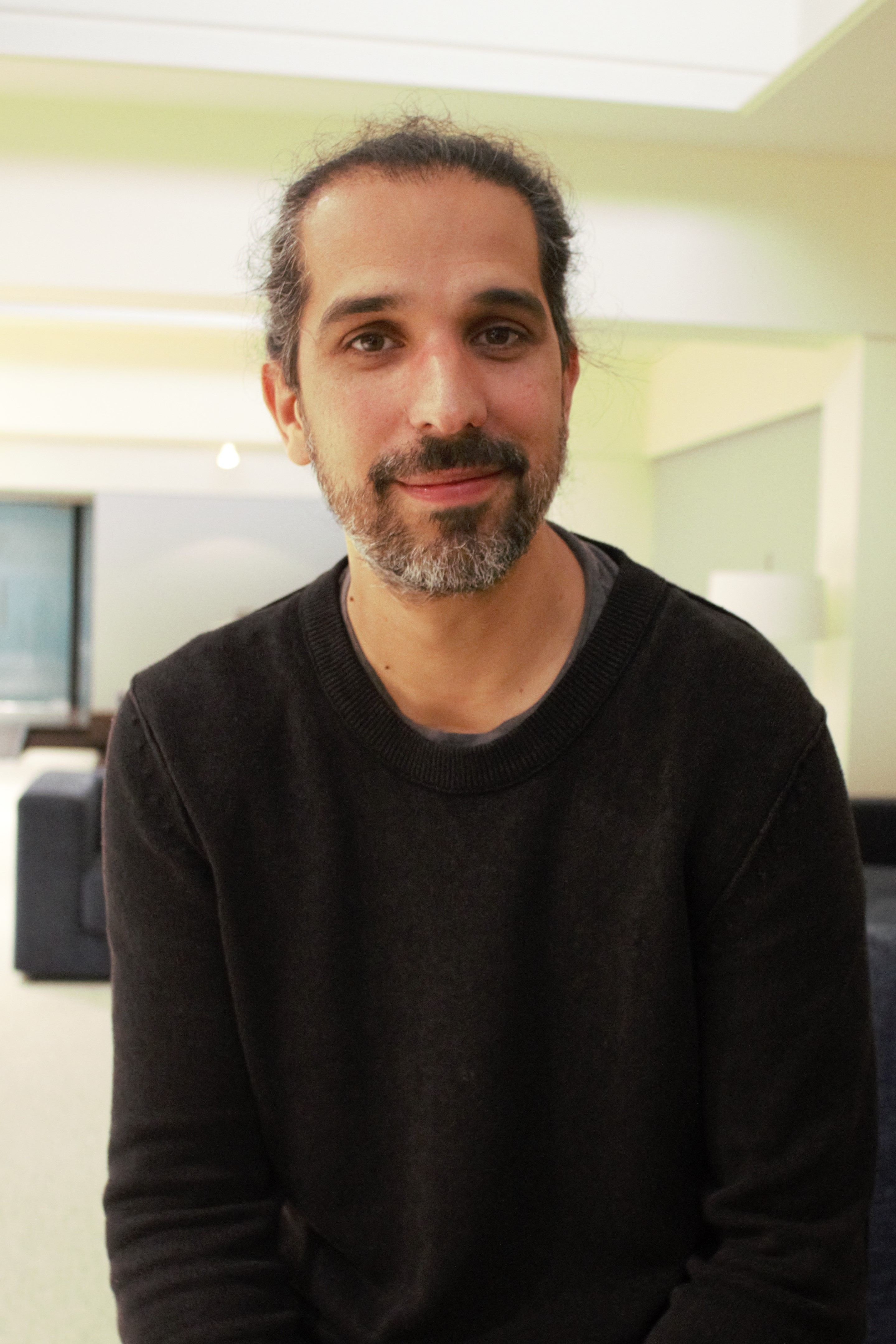 El director de cinema Javier Ruiz Caldera al Saló del Còmic de Barcelona, on va presentar la pel·lícula Super López. Saló Internacional del Còmic de Barcelona de 2018.